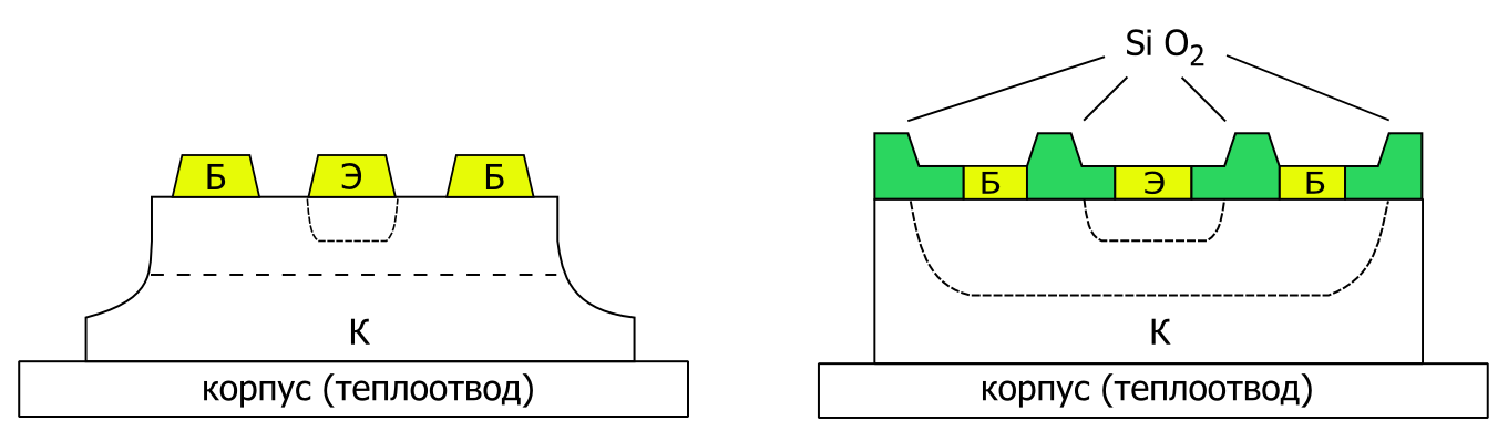 Сравнение планарного транзистора по Эрни (первое поколение, справа) с меза-транзистором (слева)